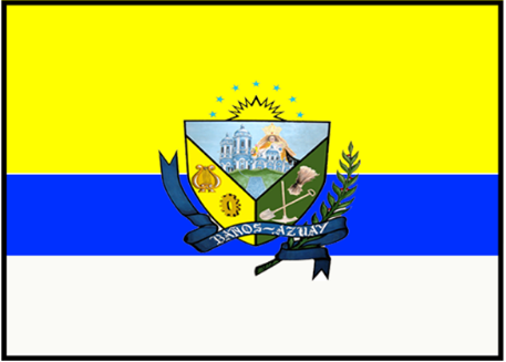 Bandera de la parroquia